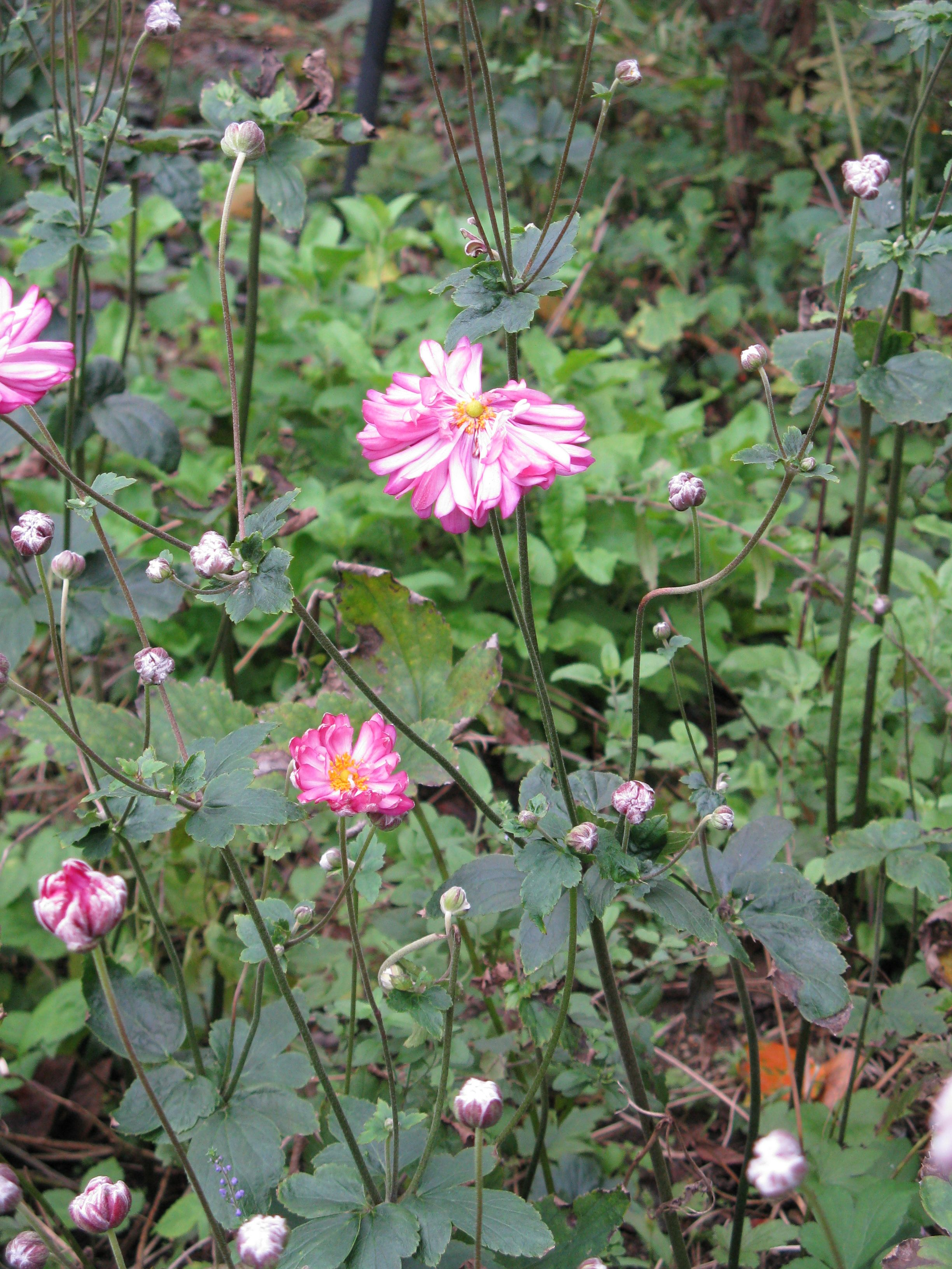 Anemone hupehensis var. japonica